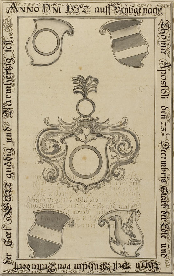 St.-Gallus-Kirche in Ladenburg. Abgegangener Epitaph von Wilhelm von Bettendorf. Wappen: von Bettendorf, von Gemmingen, von Bettendorf, von Emershofen, von Helmstatt.